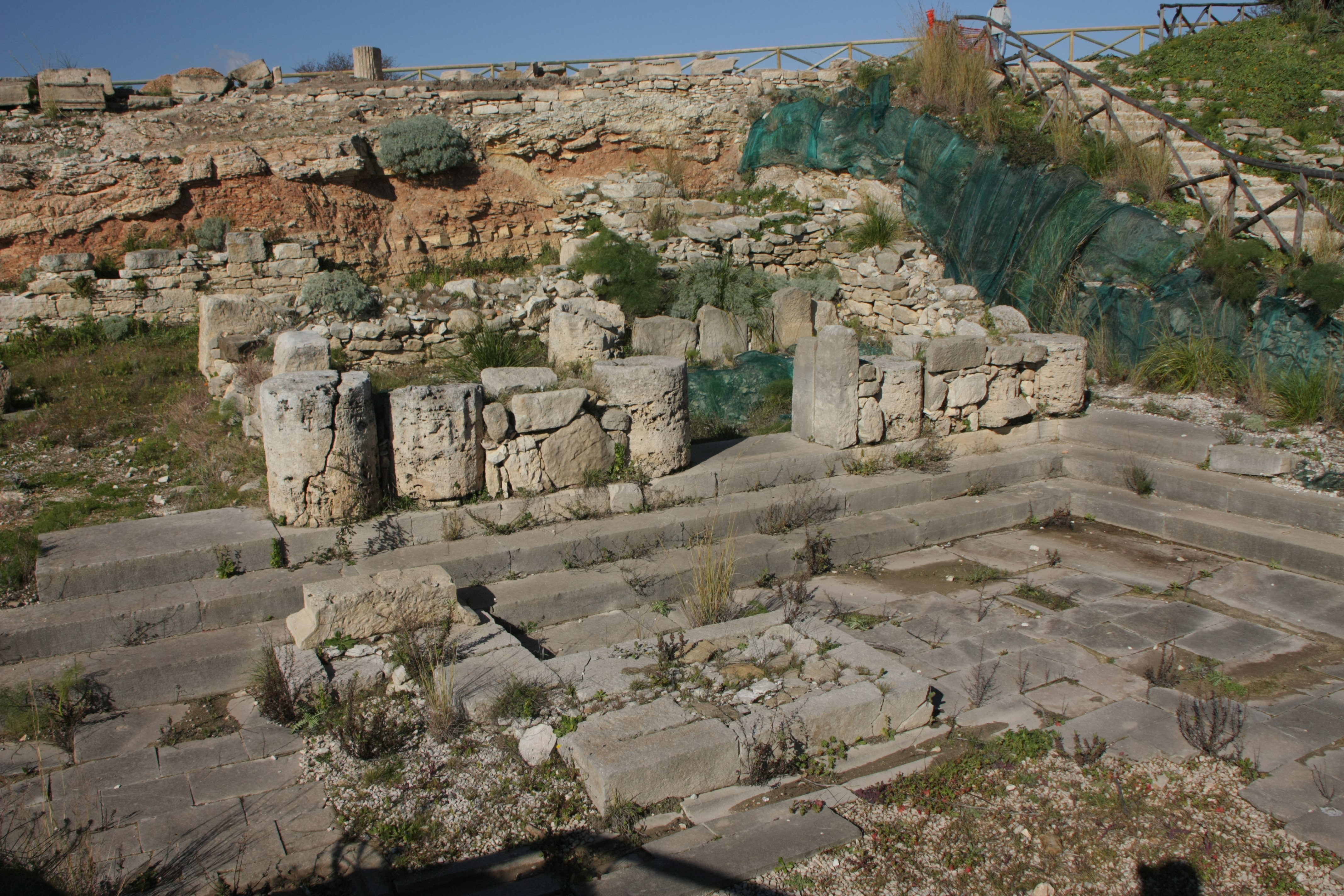 Agora di Segesta